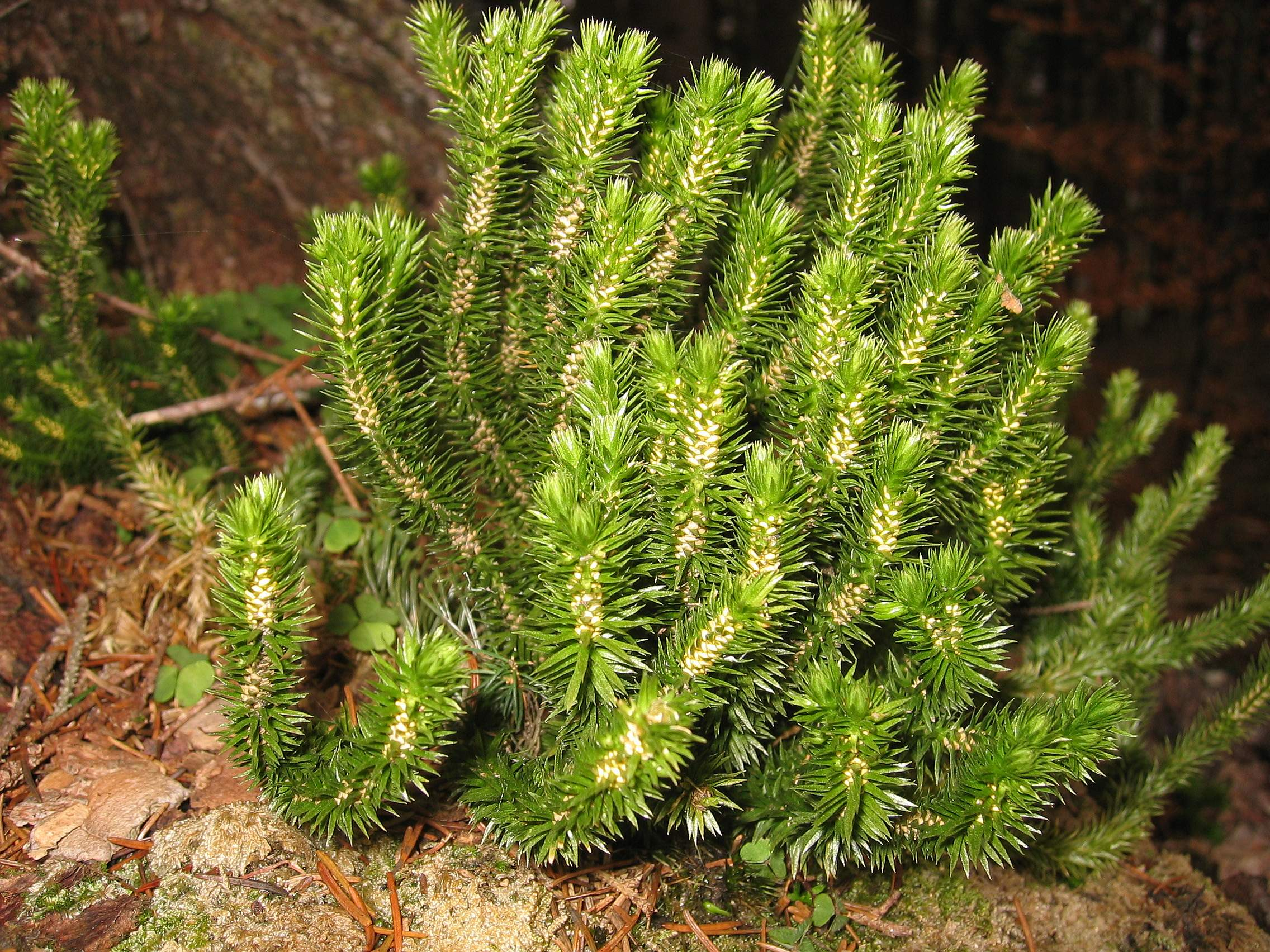 Huperzia selago near Rosenegger Alm, Upper Austria, Austria